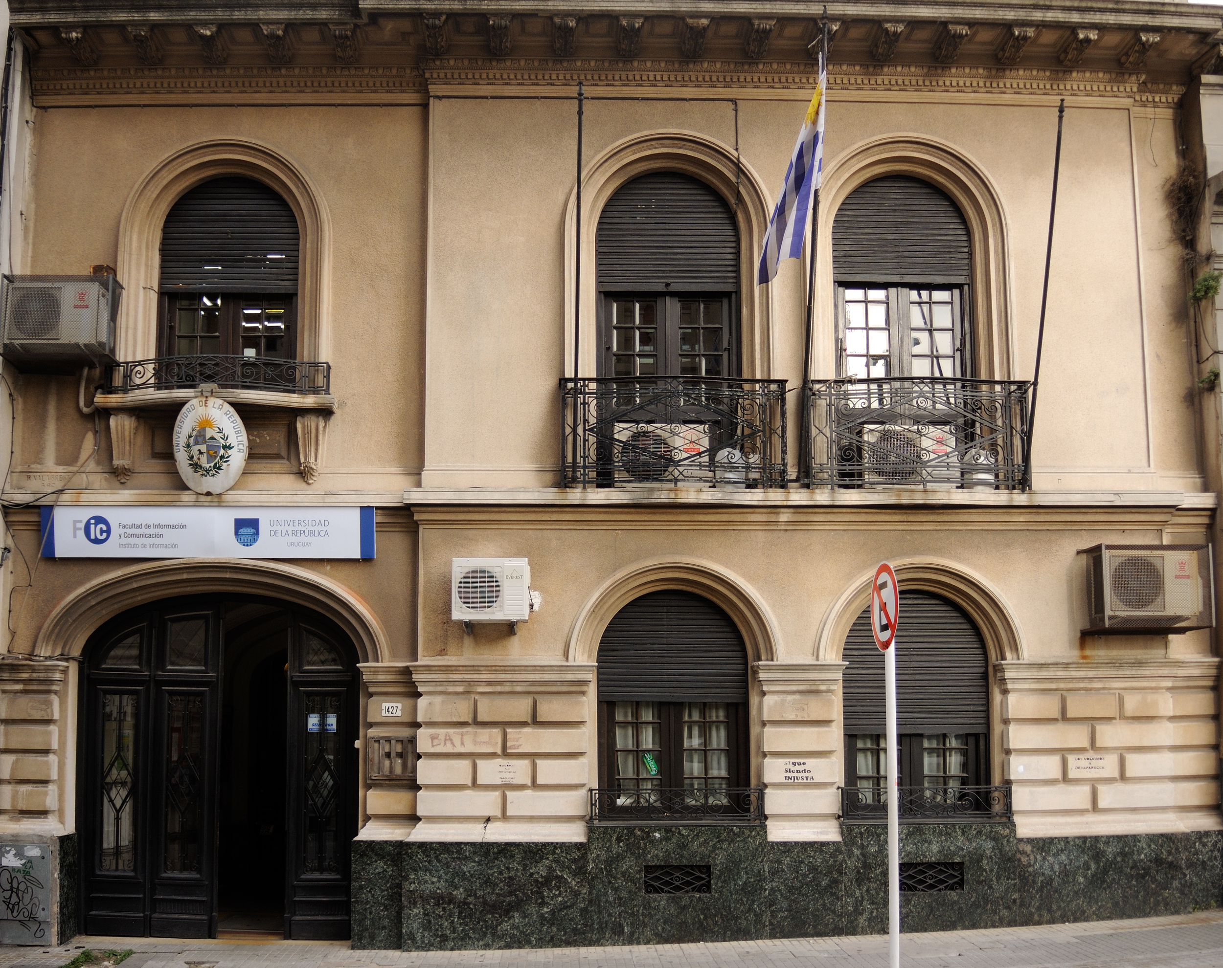 Instituto de Información de la Facultad de Información y Comunicación, Universidad de la República (UdelaR), Uruguay.